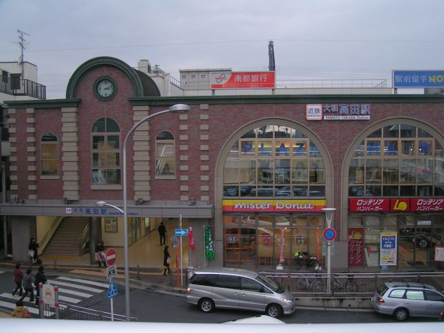 近鉄・大和高田駅